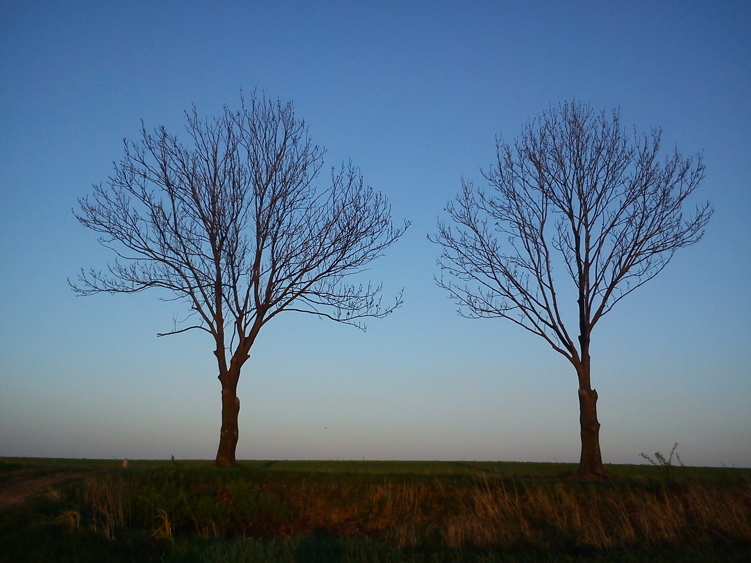 Wolęcin - pejzaż wieczorny.